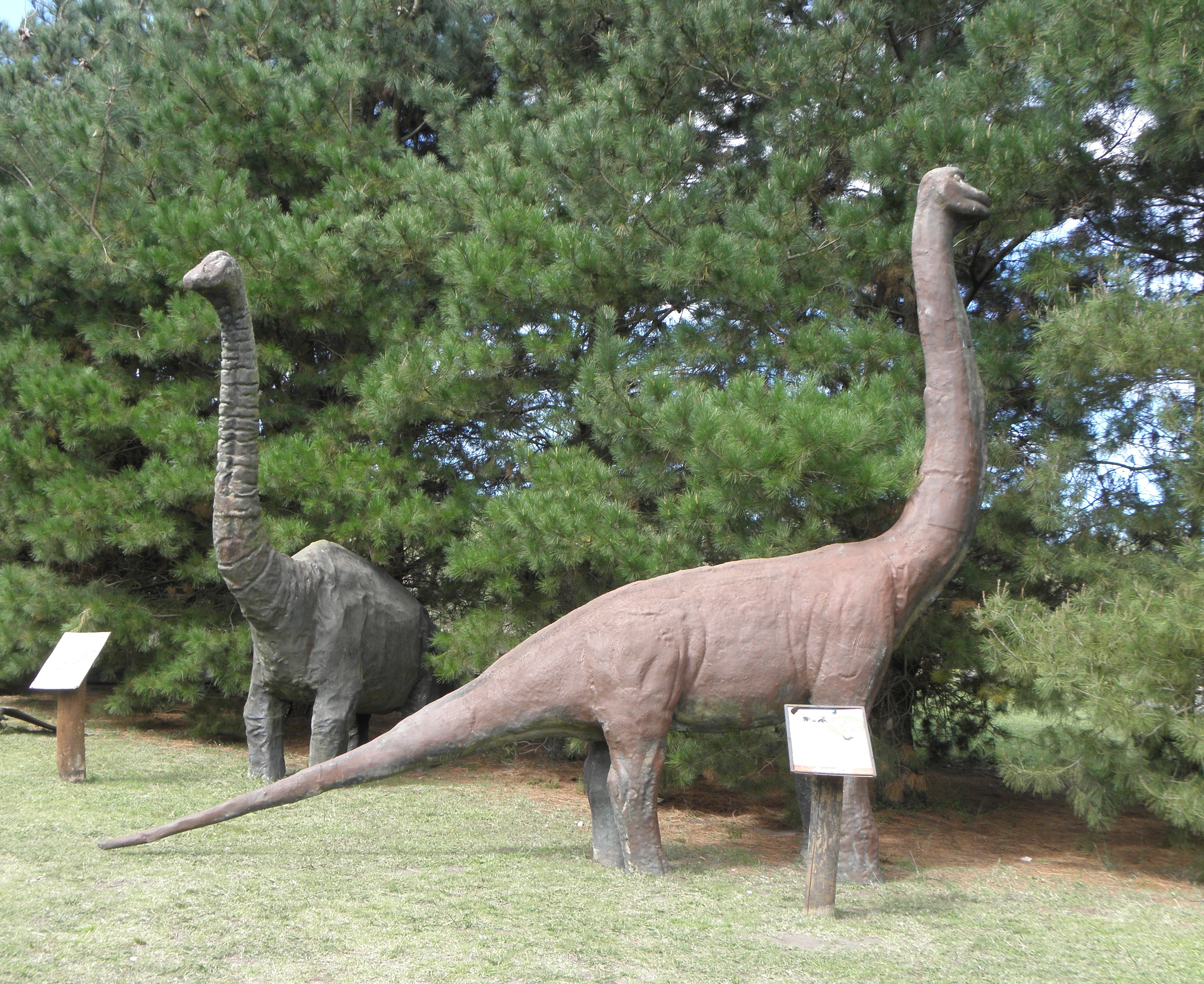 Réplicas a tamaño natural de diversas especies de dinosaurios; Zoológico de Batán, provincia de Buenos Aires, Argentina.